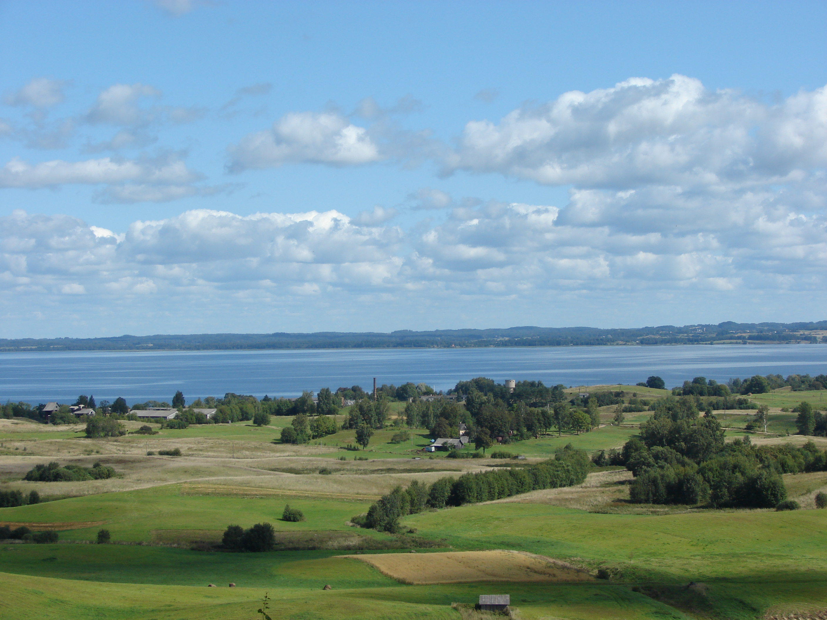 Rāznas ezers, Mākoņkalna pagasts, Rēzeknes novads, Latvia